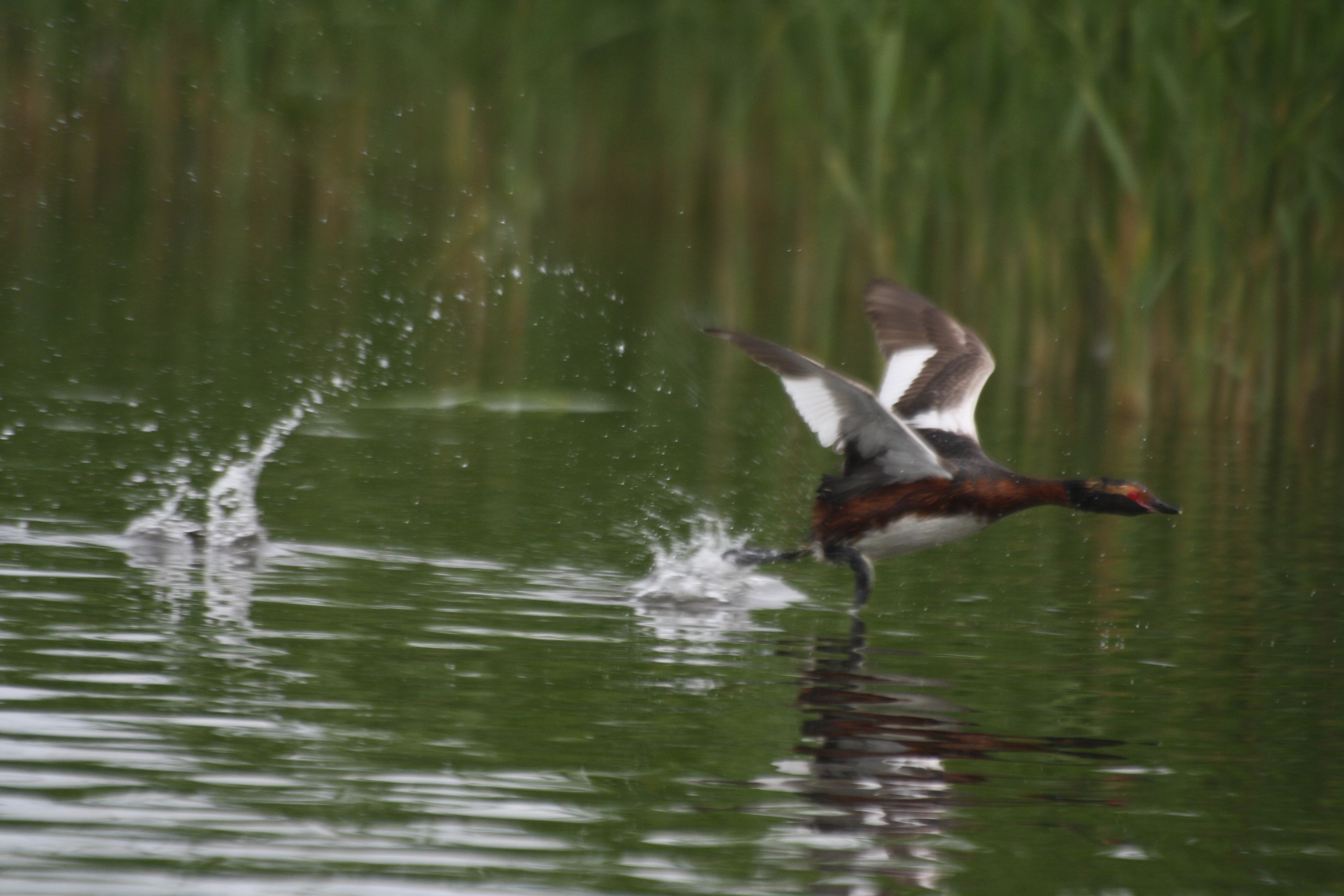 Sarvikpütt (Podiceps auritus)